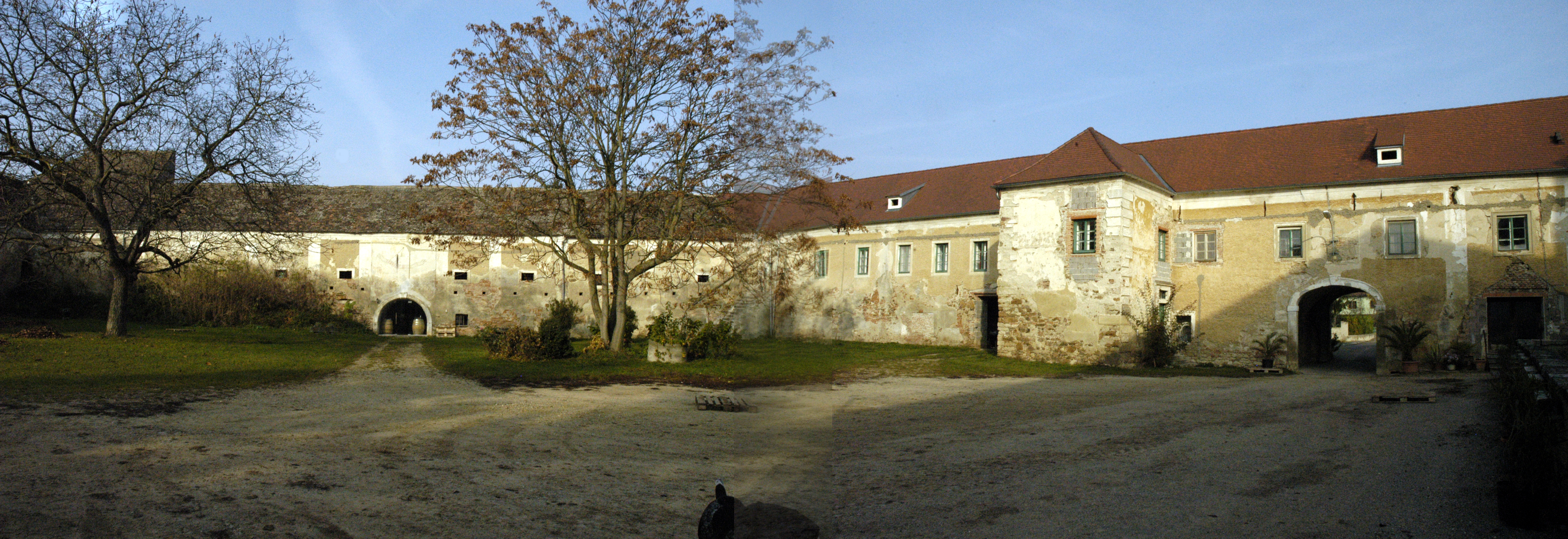 Panorama / West- und Nordtrakt des ehemaligen Wirtschaftshofes in Unterdürnbach, Gemeinde Maissau